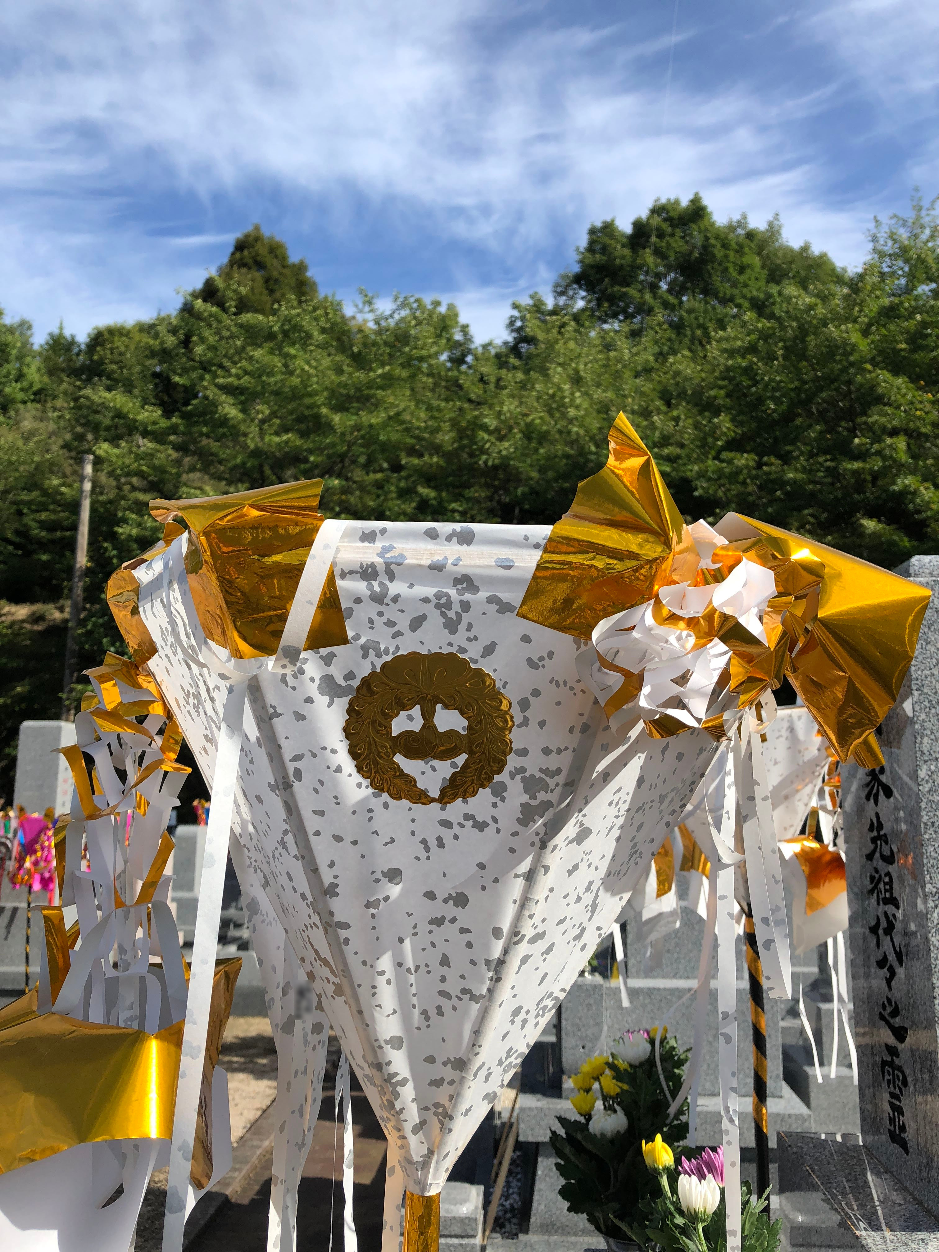 広島県安芸地方の初盆で用いられる白色の盆燈籠